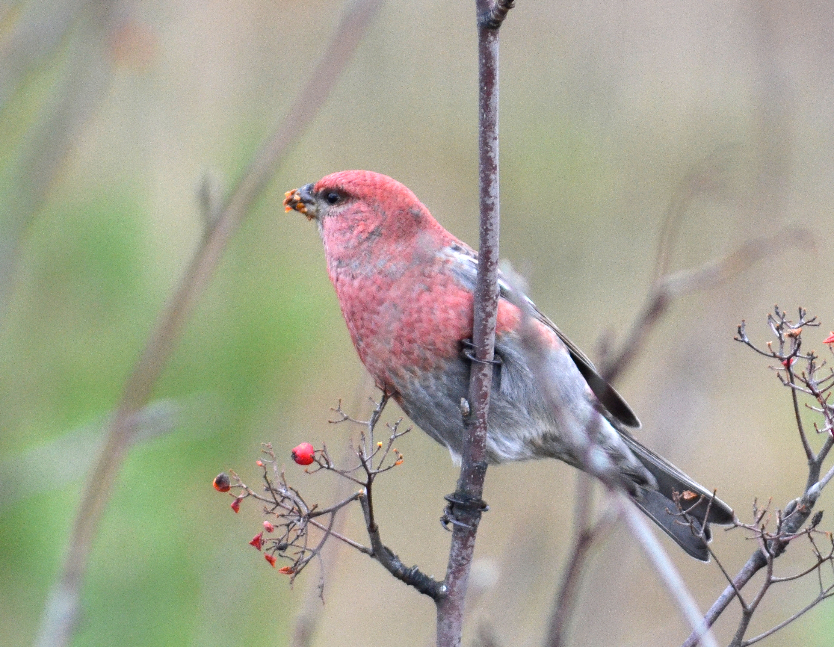 Pinicola enucleator, adult male, Kotka, Finland